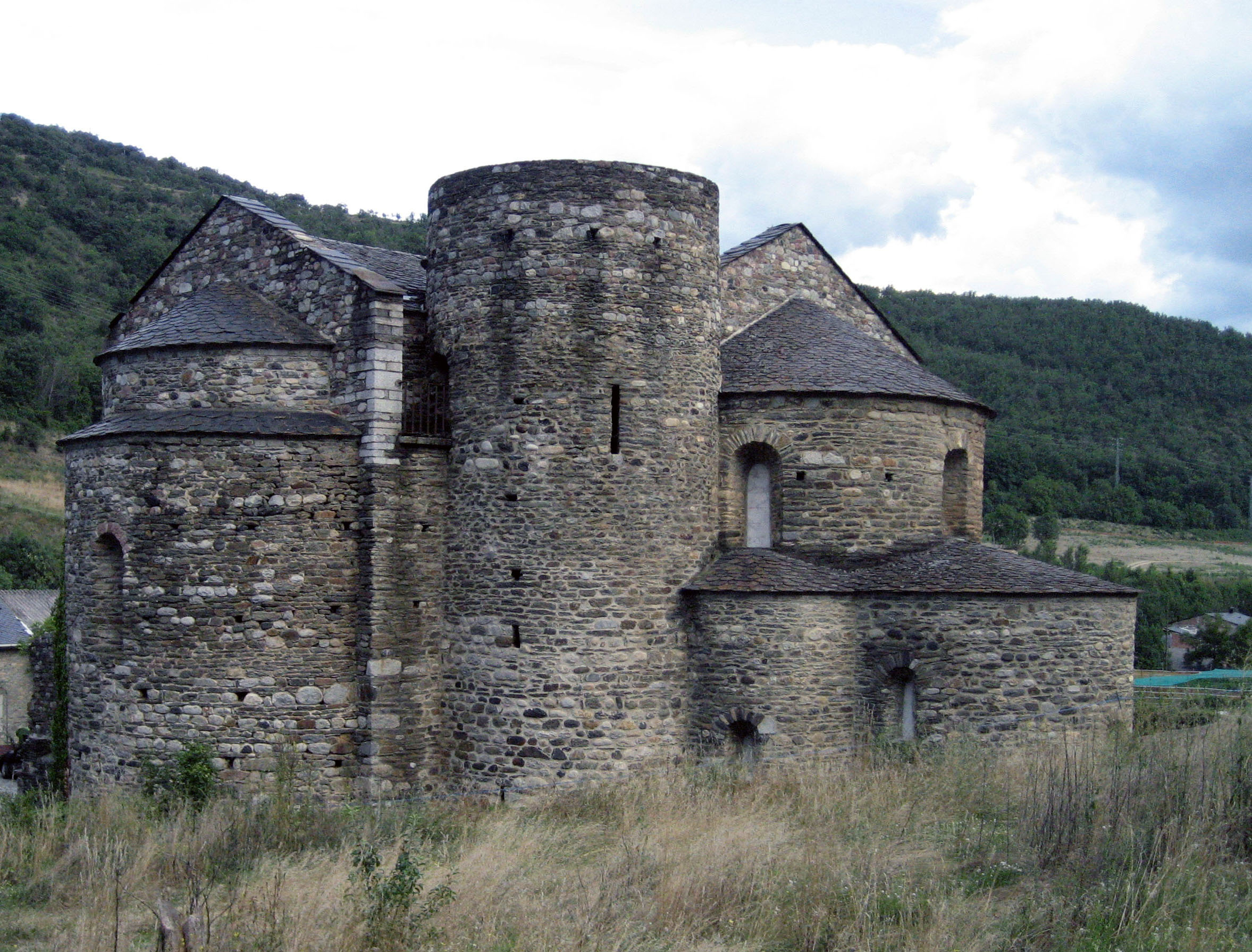 Ábside lateral con vista de los restos del campanario redondo del monasterio de Sant Sadurní de Tavèrnoles de Anserall en la comarca del Alto Urgel en Cataluña (España)